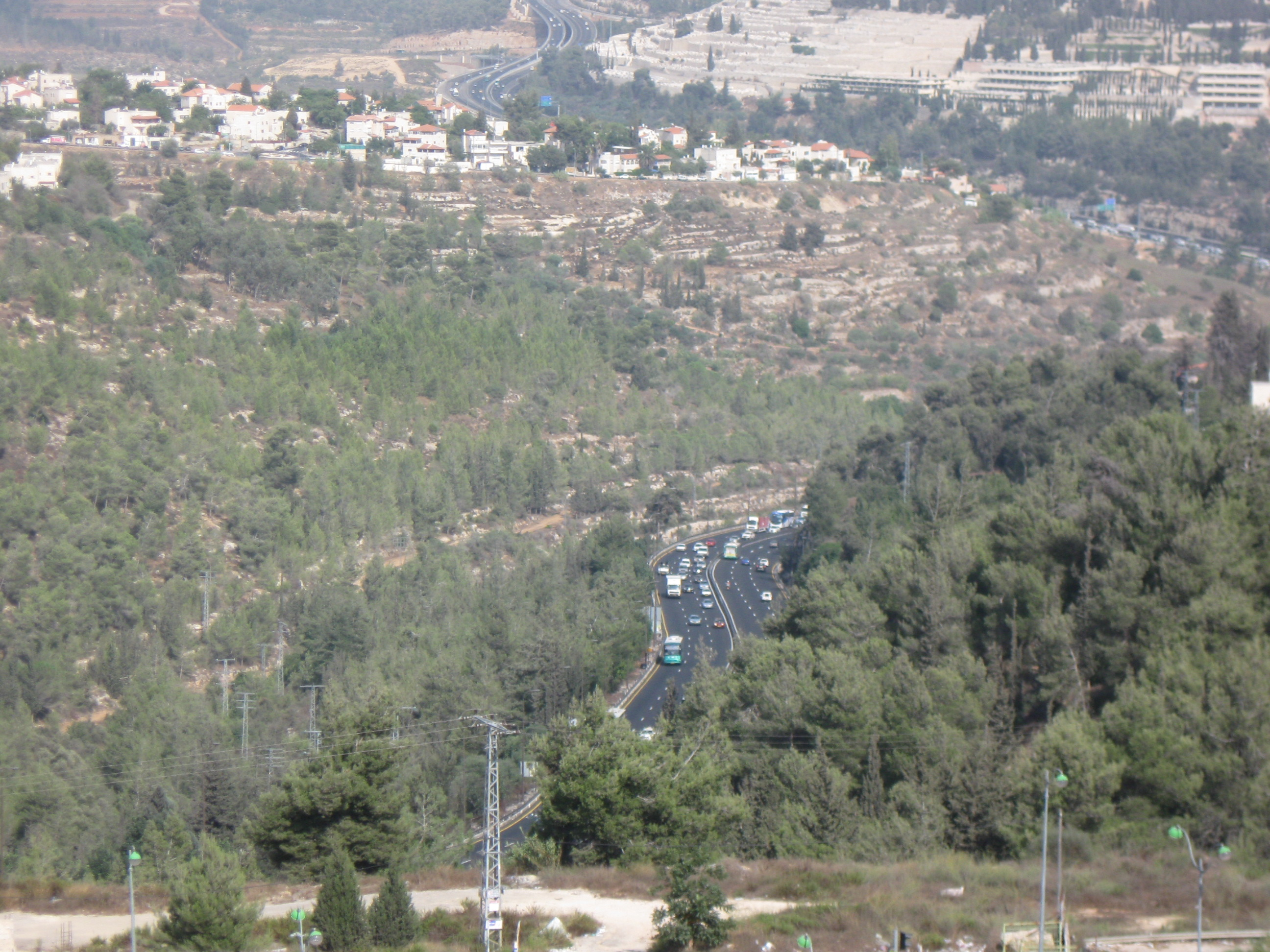 הקסטל